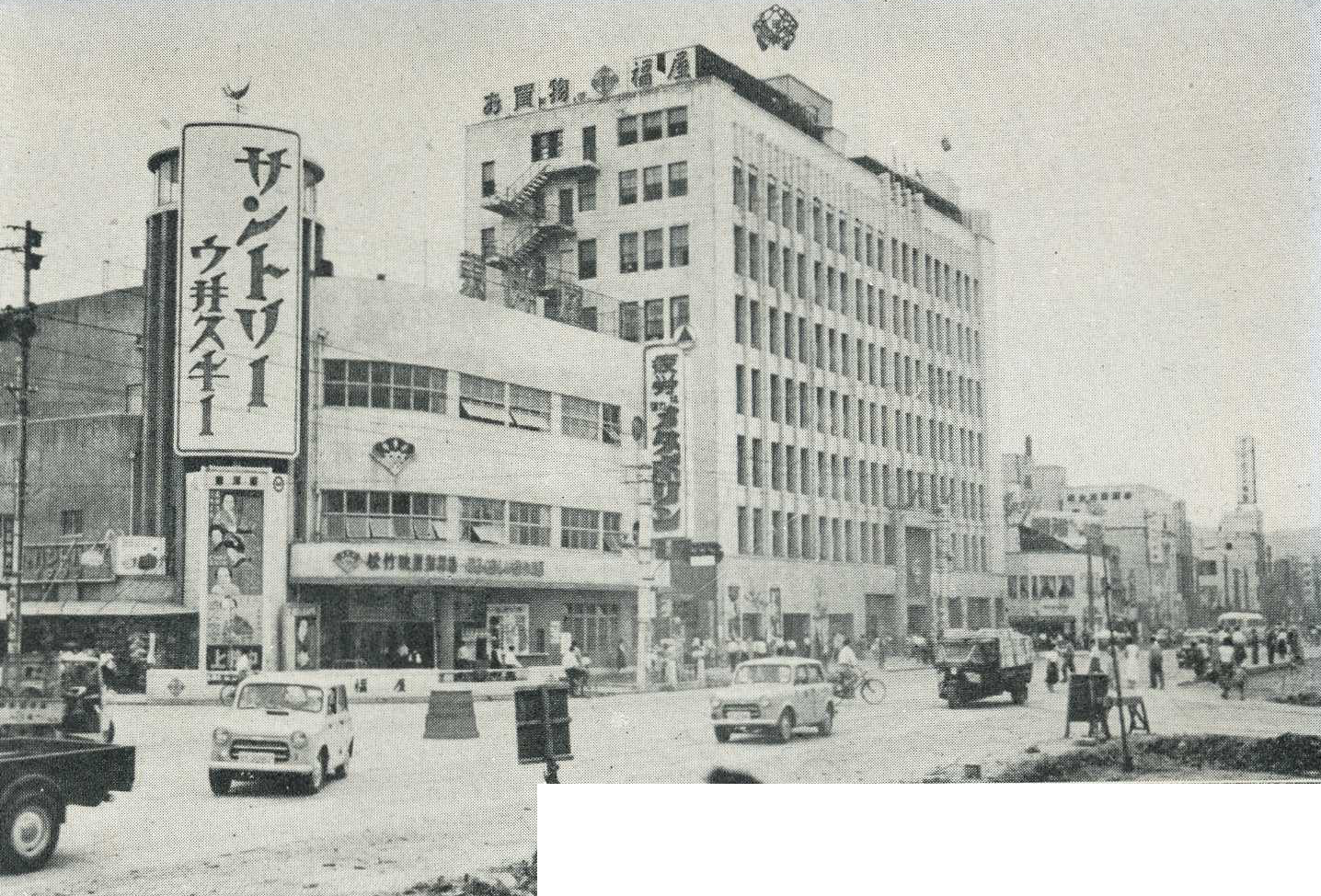 1955年の広島市八丁堀交差点。中央が福屋、左が東洋座。